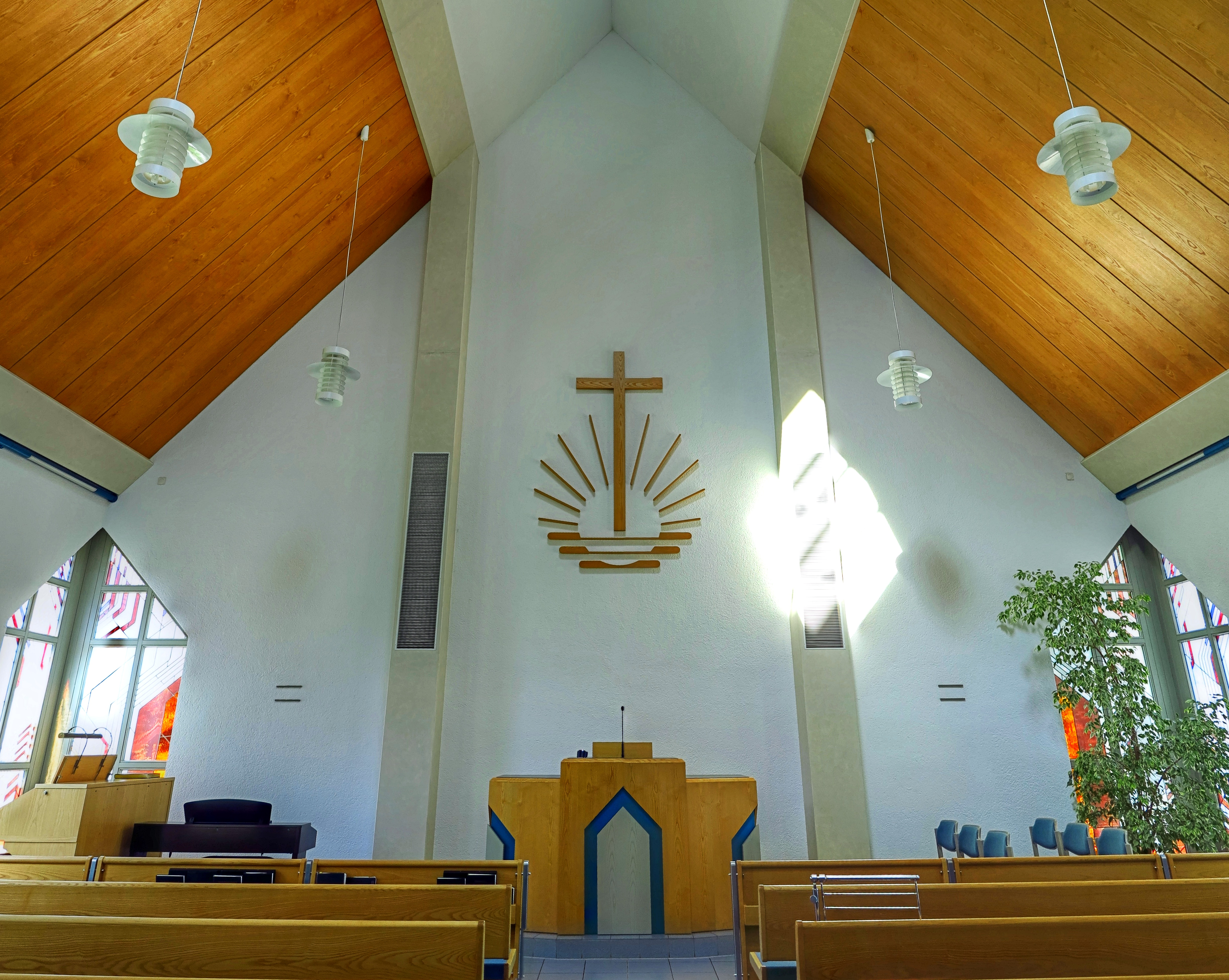 Deutschland, Bayern, Landkreis Fürstenfeldbruck, Gröbenzell, Neuapostolische Kirche, Altarraum